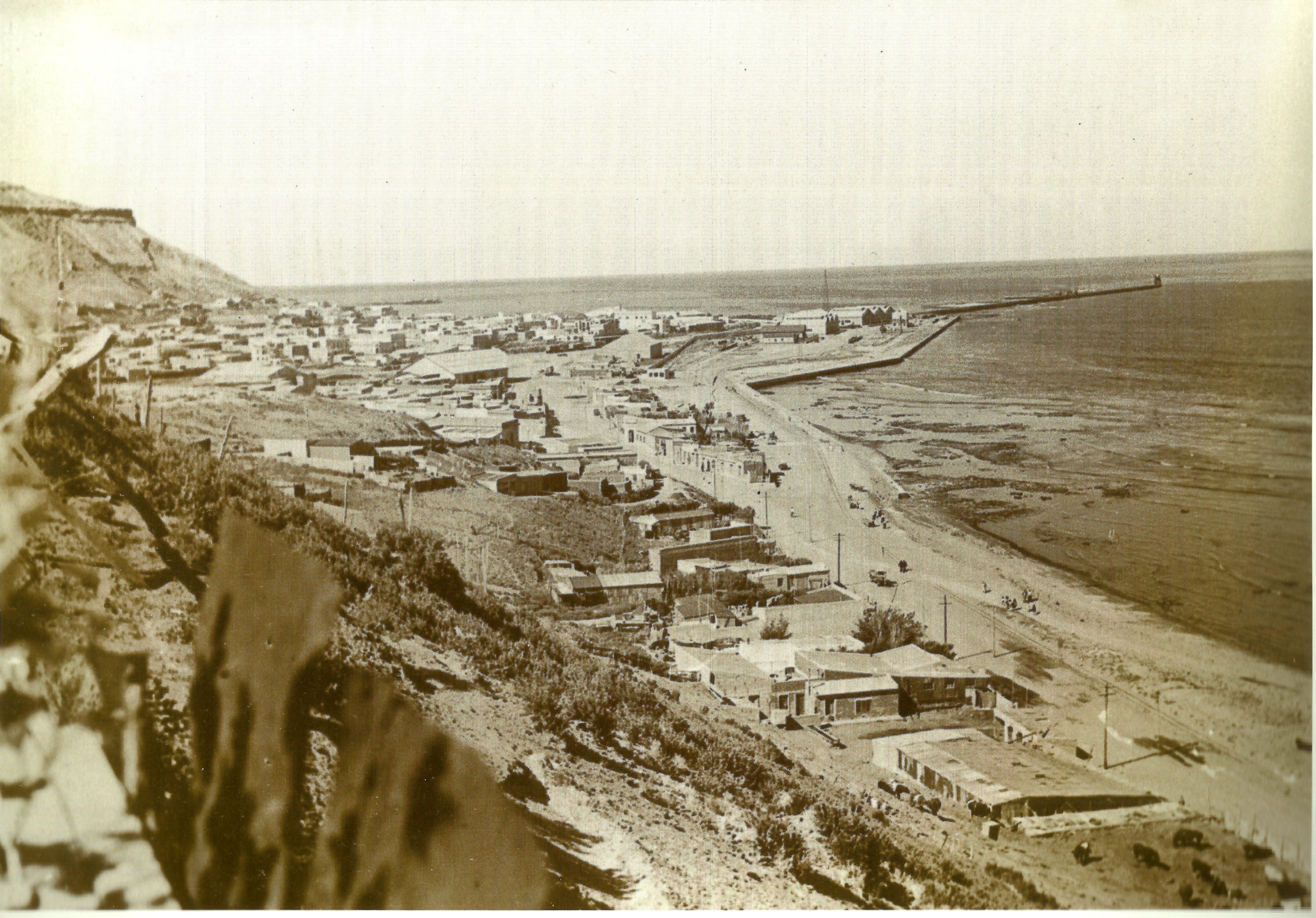 Vista desde la calle Maipú entre Francia e Italia. Se observa la vía de la línea a Punta Piedras o Rada Tilly, pasando por lo que hoy es la Ruta 3 al frente del actual Hospital Regional. Se divisa una cantidad considerable de gente al costado de las vías.